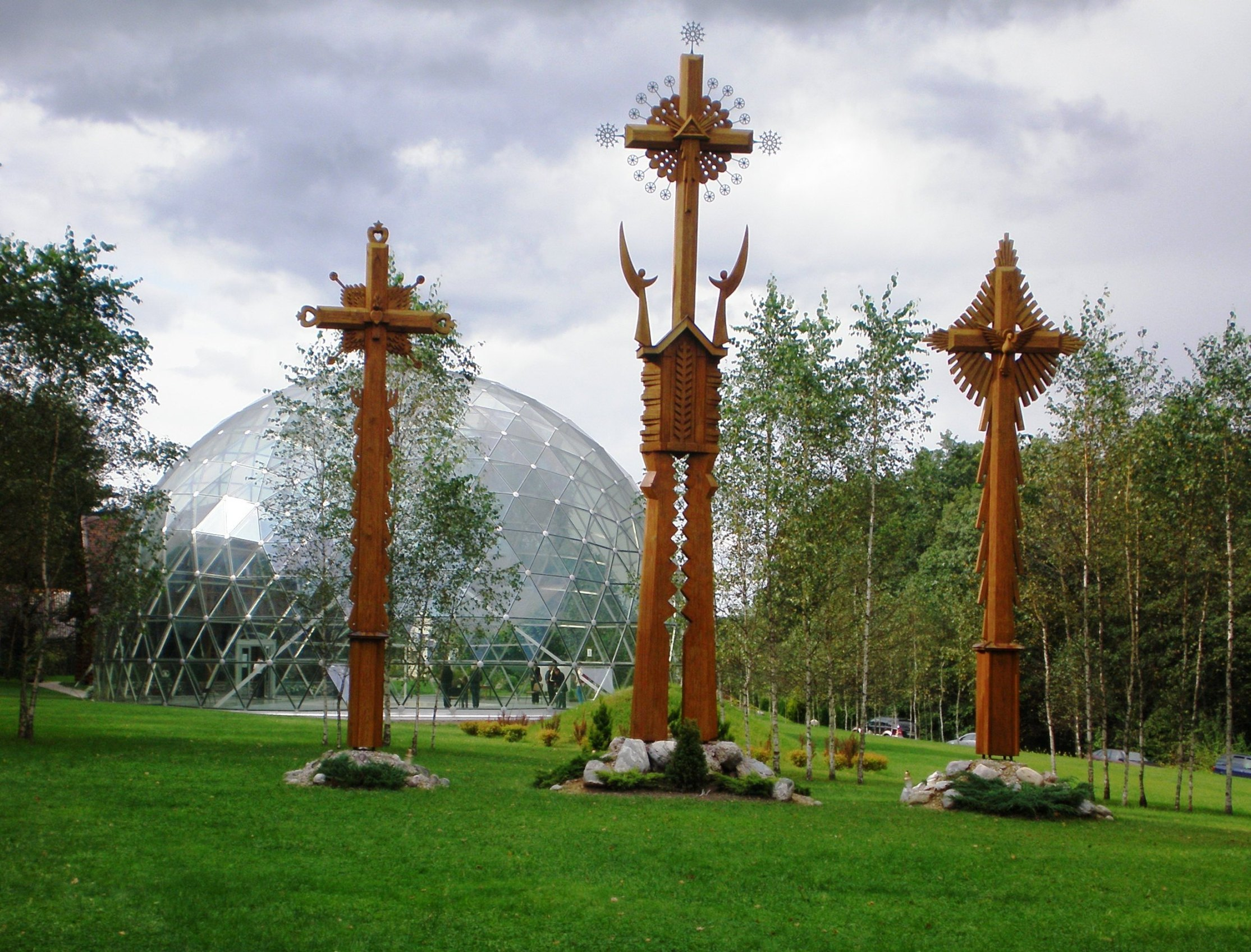 Česukų piramidė, Varėnos raj.